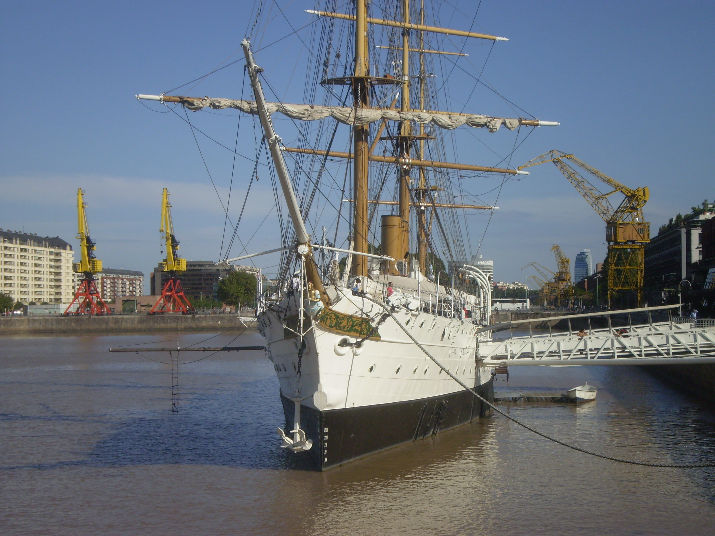 Buque Museo Fragata A.R.A. Presidente Sarmiento, amarrada en puerto Madero, Buenos Aires, Argentina